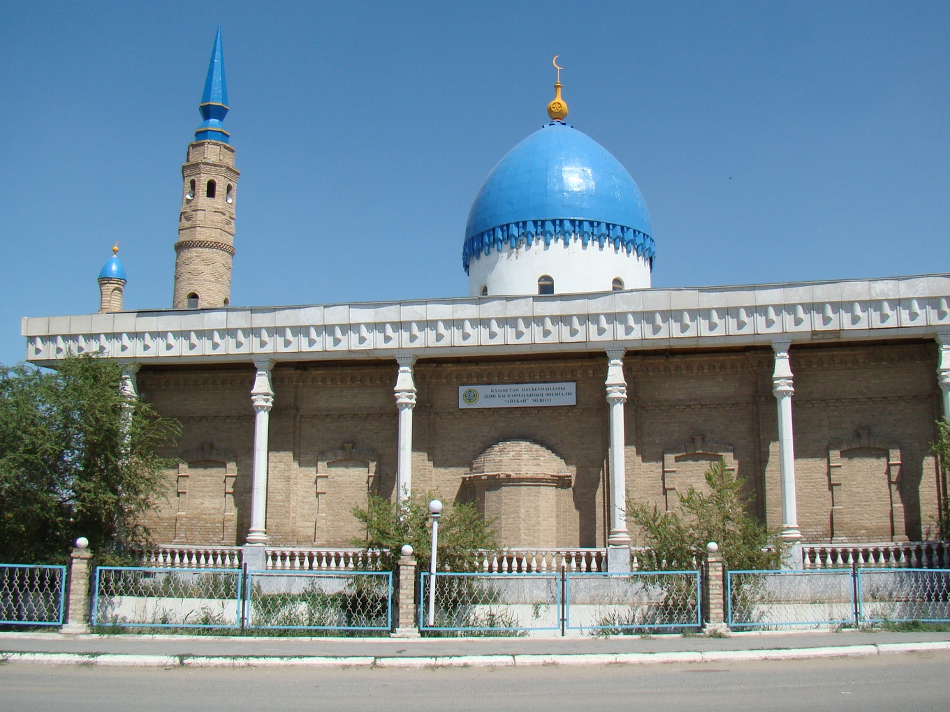 Мечеть Айтбая, Кызылорда. Фасадная часть здания, сохранившаяся историческая кладка.